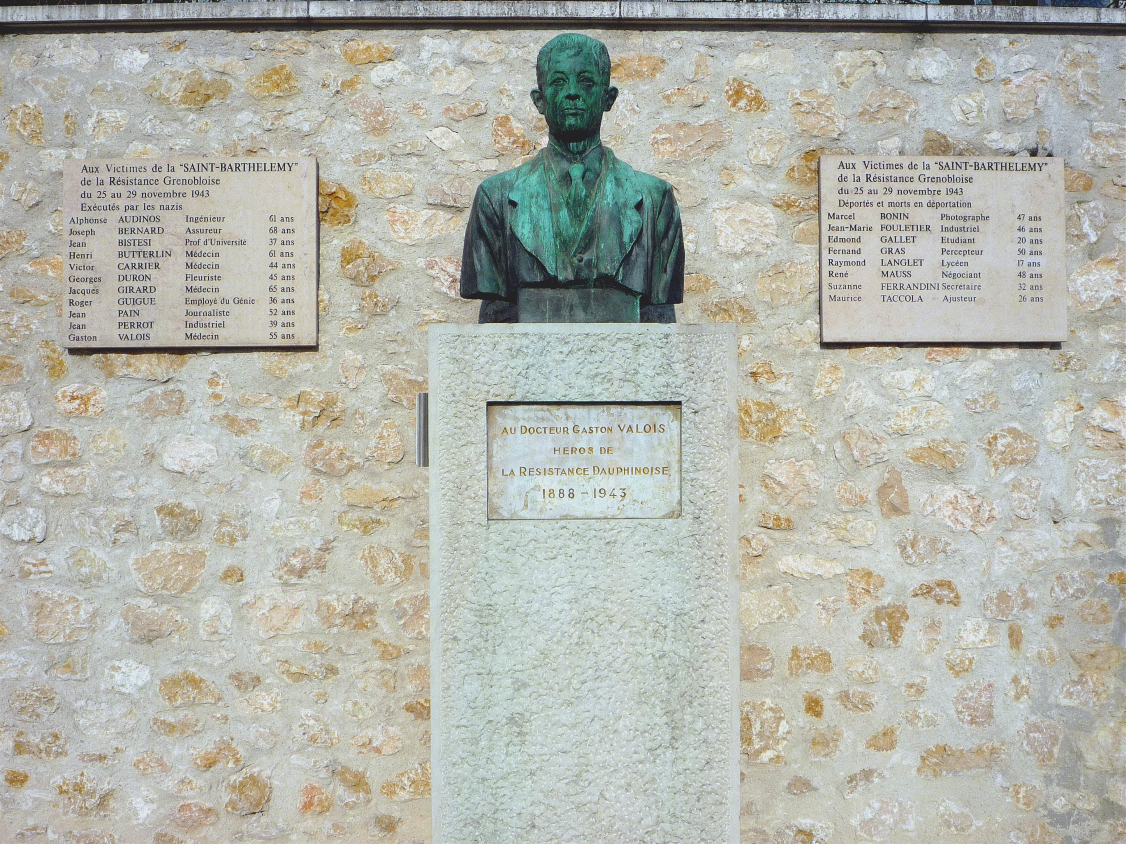 Monument commémoratif de la Saint-Barthélemy grenobloise en novembre 1943. (installé rue Jules Horowitz - Grenoble) ; Au docteur Gaston Valois